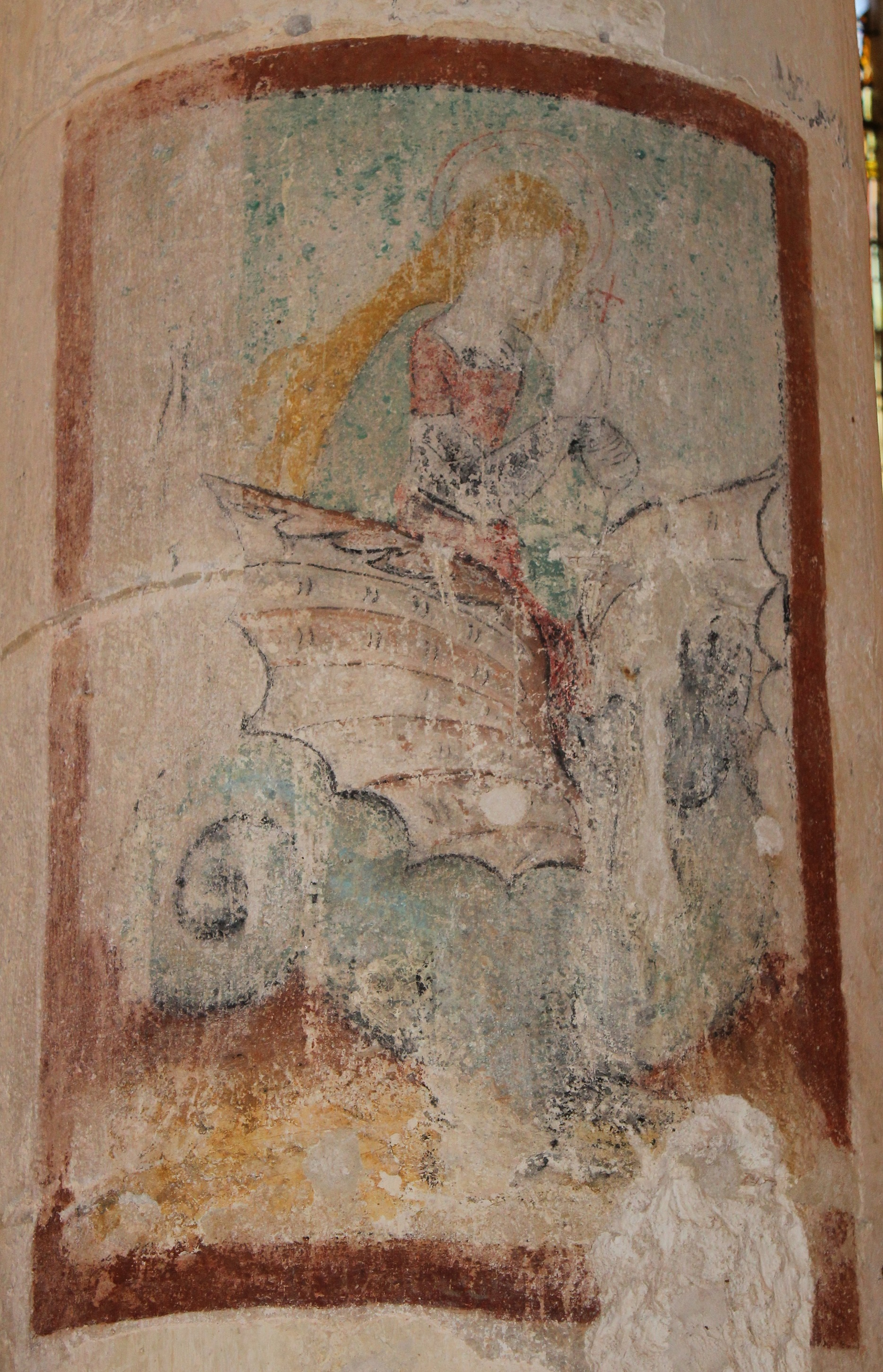 Sainte Marguerite de Creuë.